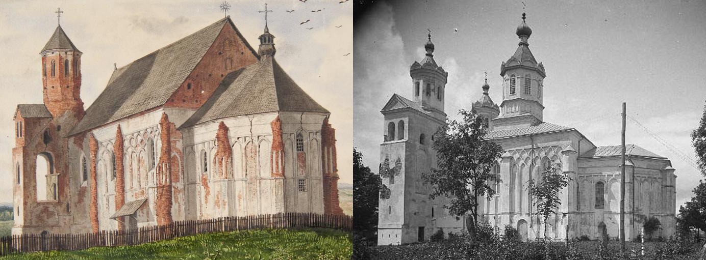 Беларуская (тарашкевіца): Маскалізацыя (русіфікацыя) Вялікага Княства Літоўскага. Места Наваградак. Царква Сьвятых Барыса і Глеба, помнік архітэктуры готыкі і рэнэсансу XVI стагодзьдзя: аўтэнтычны выгляд (налева) і па частковым руйнаньні ў выніку маскоўскай перабудовы (направа)